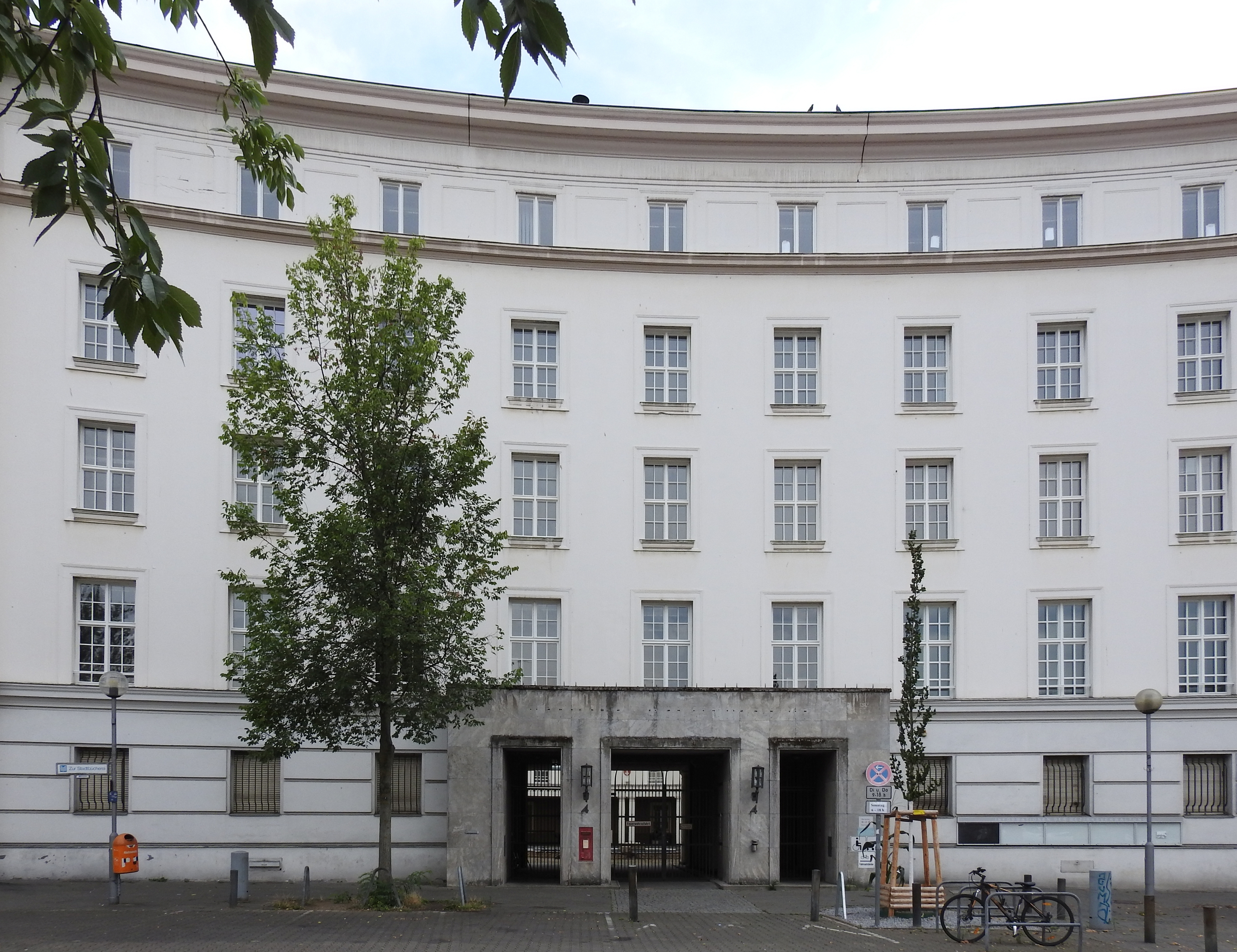 ehemaliges Rathaus Wilmersdorf (Fehrbelliner Platz 4) in Berlin-Wilmersdorf.